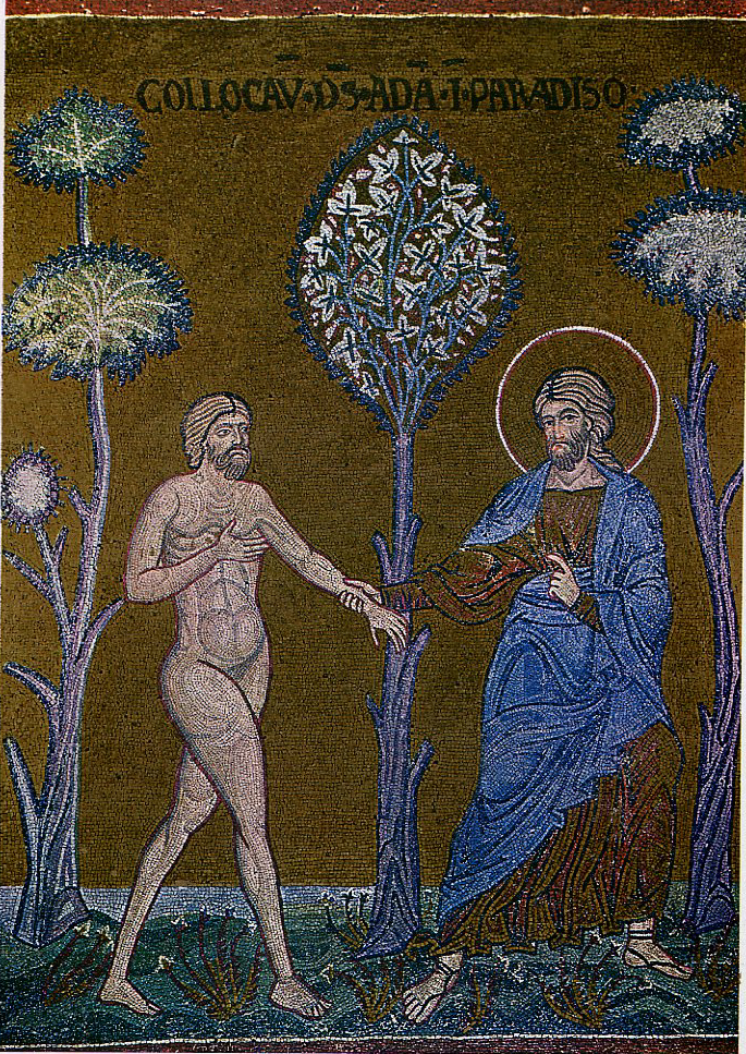 Adam is enterind in Eden. Ведомый Богом вступает Адам в рай. Byzantine mosaic in Monreale